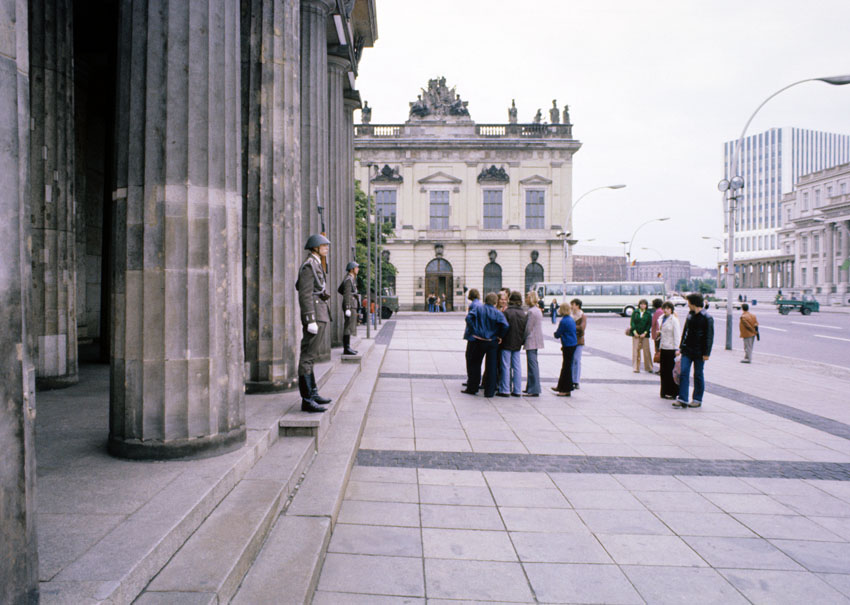 Neue Wache, Berlin (DDR) Ehrenwache NVA-Wachregiment "Friedrich Engels" Juli 1977, © Olga Bandelowa © Olga Bandelowa Nutzung außerhalb von Wikipedia nur mit Namensnennung, siehe Exif.